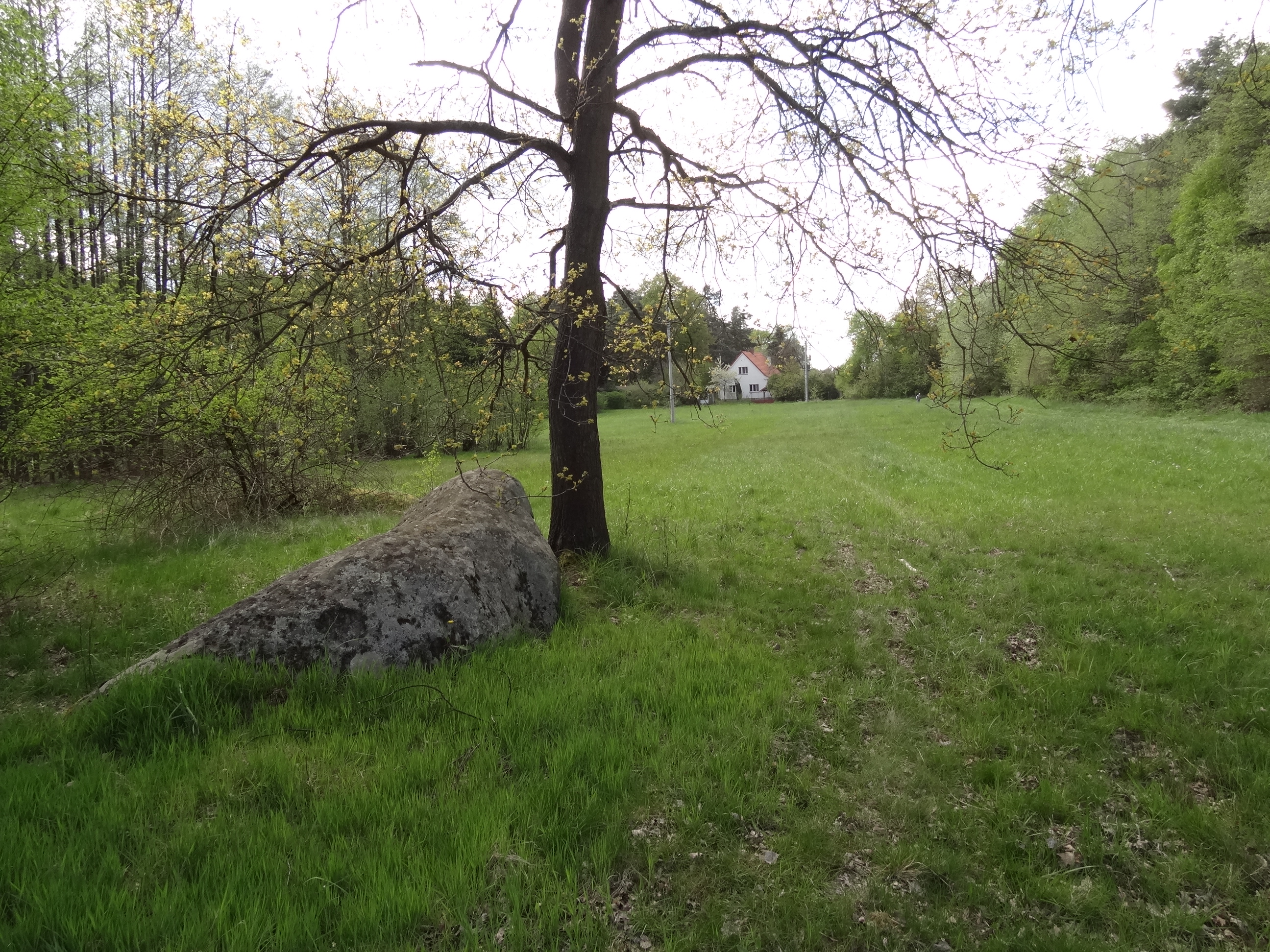 Přírodní památka Skalsko (u osady Skalsko, obec Pohoří [okres Praha-západ])